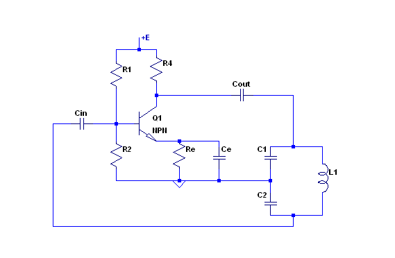 Joonis 2. Skeemi näide Colpittsi ostsillaatorist transistorist.